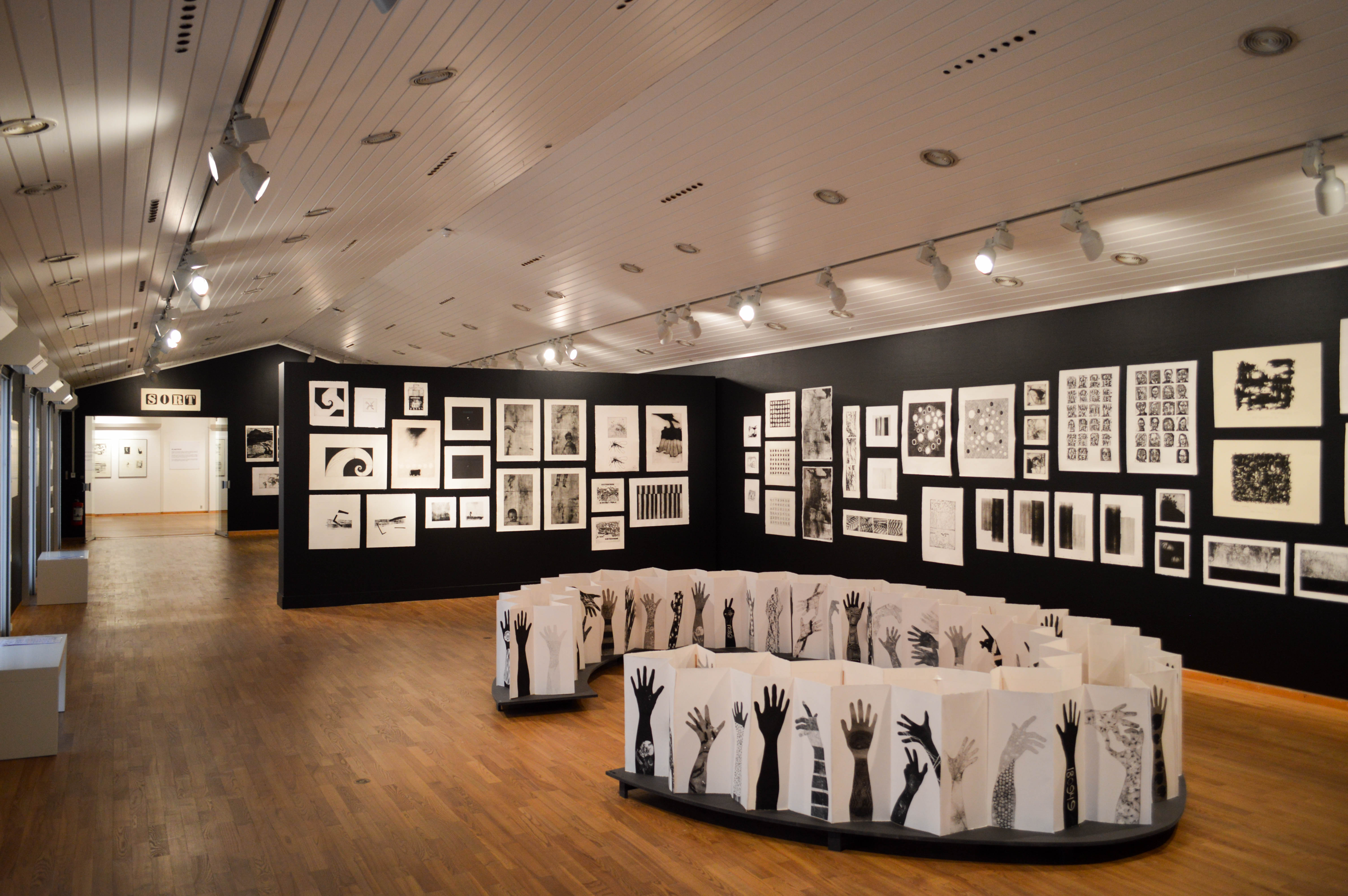 Foto fra Særudstillingen "Den Sorte Skole - Fyns Grafiske Værksted 40 år". Kastrupgårdsamlingen Feb-maj 2017